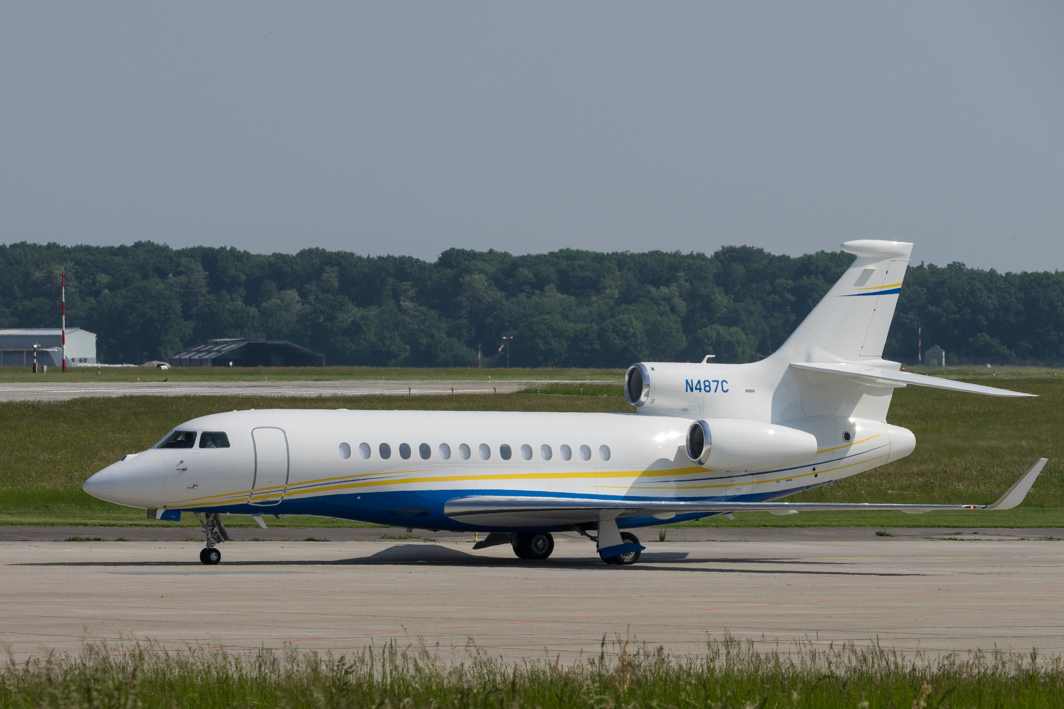 GVA 16.05.2015